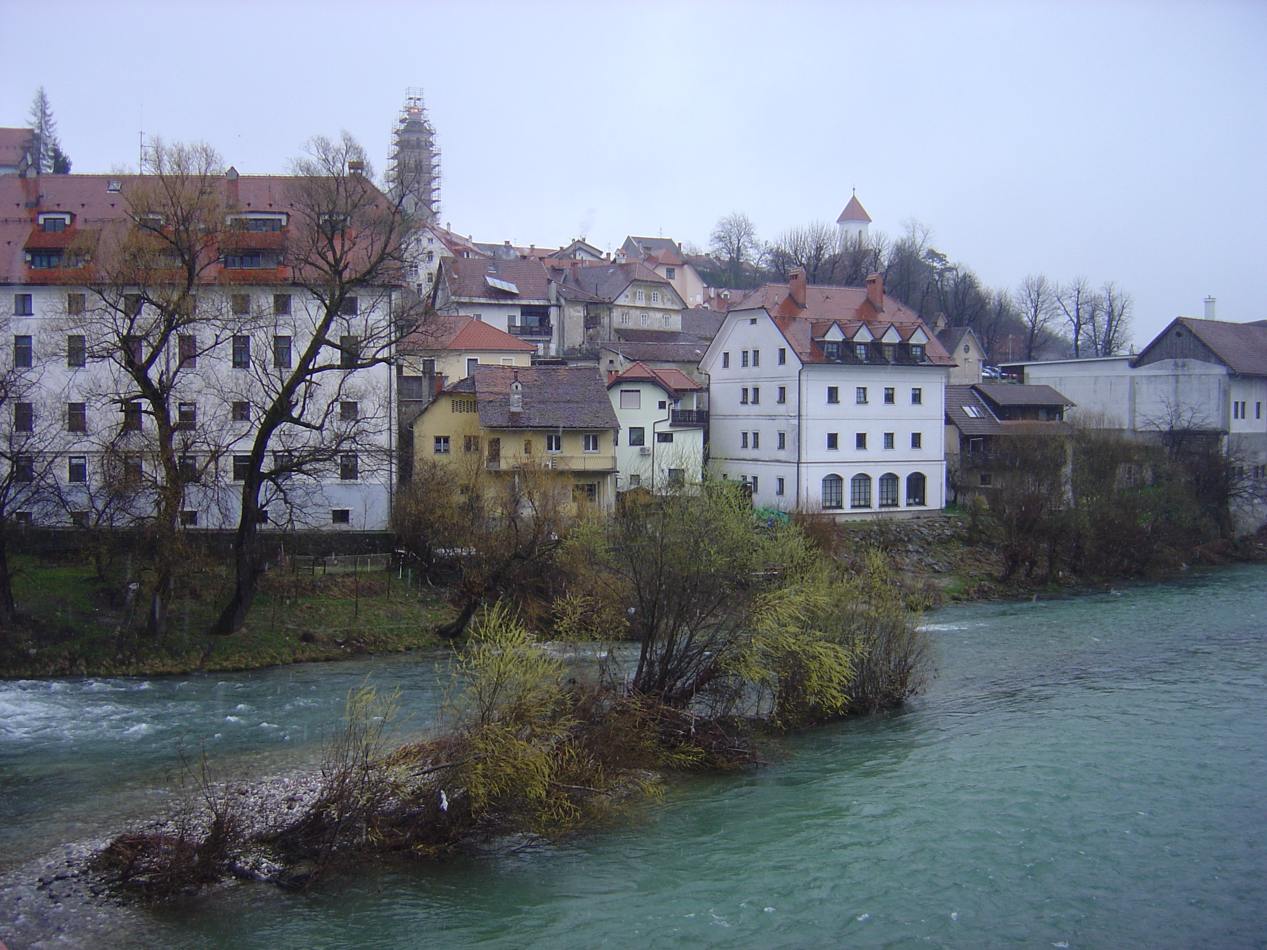 Kranj, Slovenia